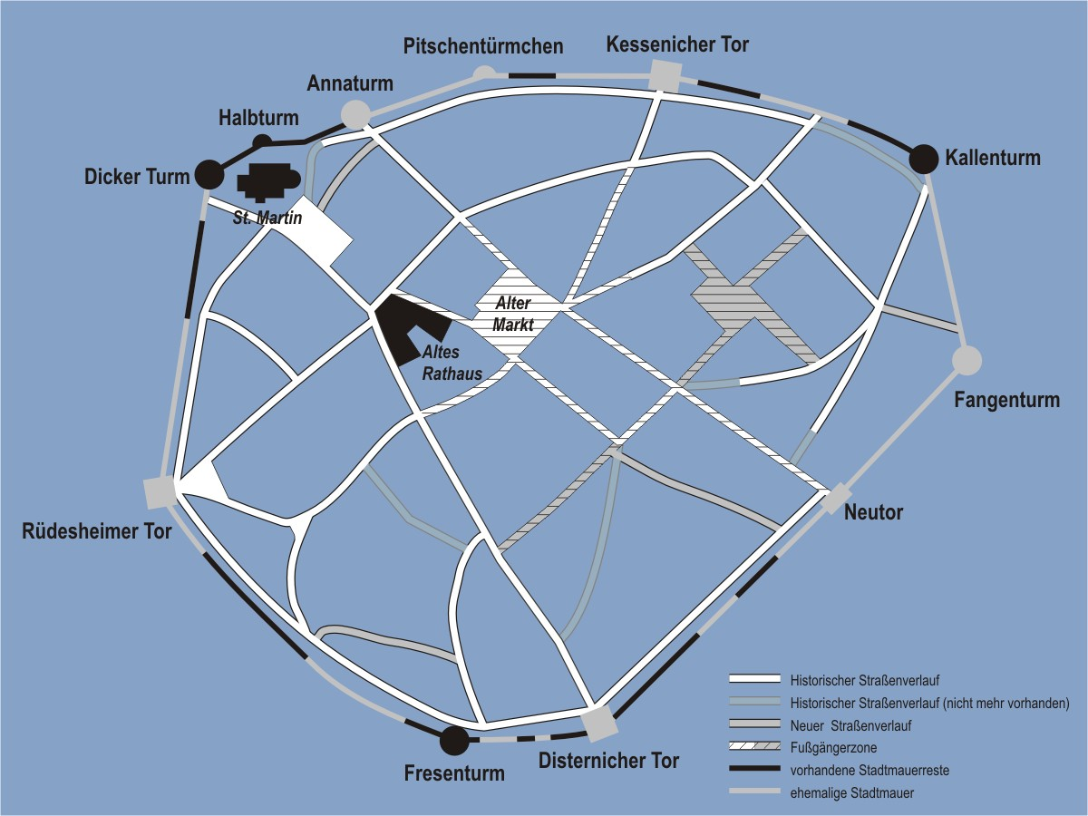 Altstadt von Euskirchen mit mittelalterlicher Stadtbefestigung